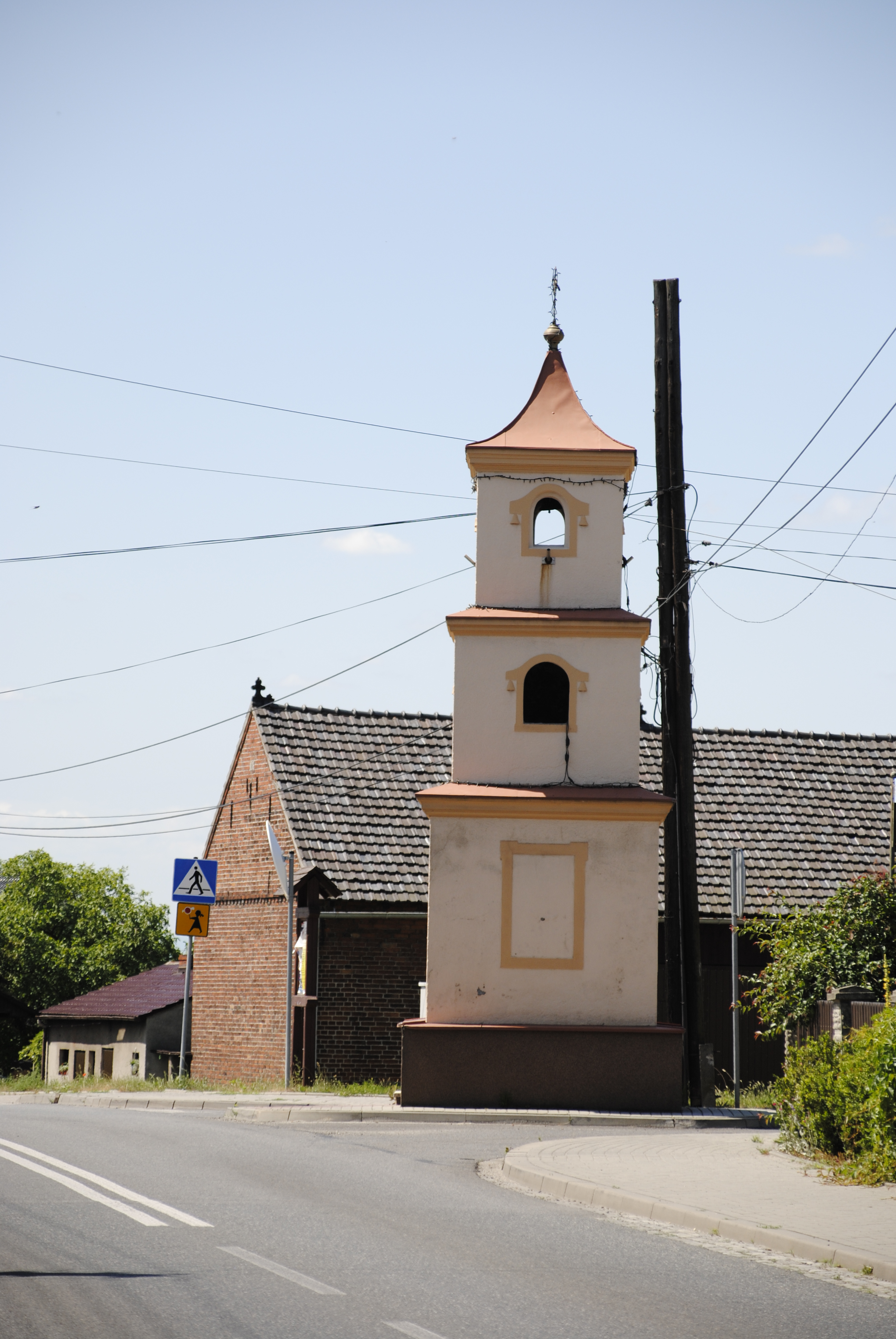 Gorek/Oberschlesien - Gemeinde Proskau - Kapelle an der ul. Opolska